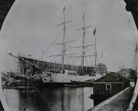 Norra varvet shipyard in Gävle in Sweden (Gävle stads norra varv)